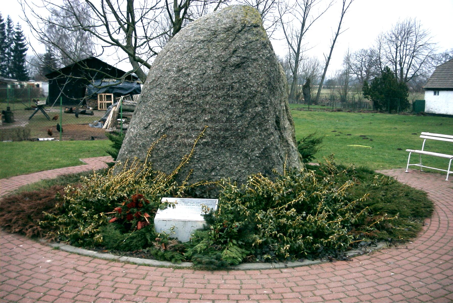 Kriegsgedenkstein Schmatzin